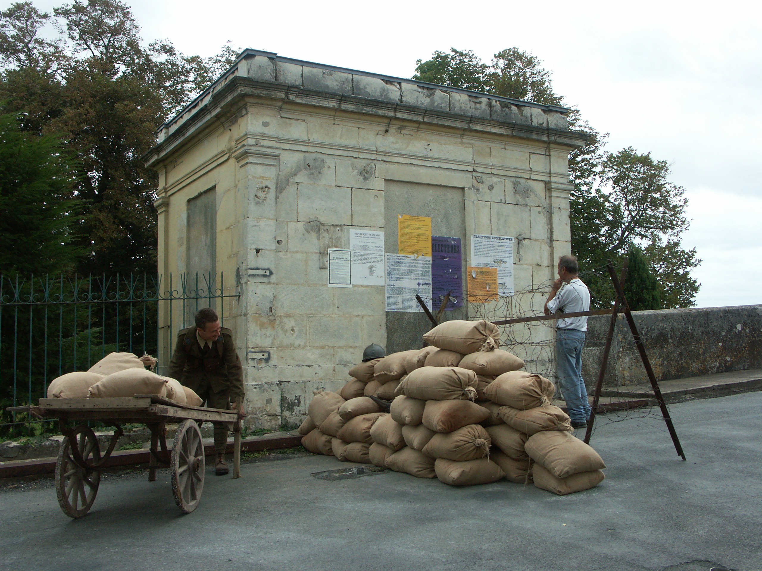 Tournage du film "Trois jours en juin" à Tonnay-Charente